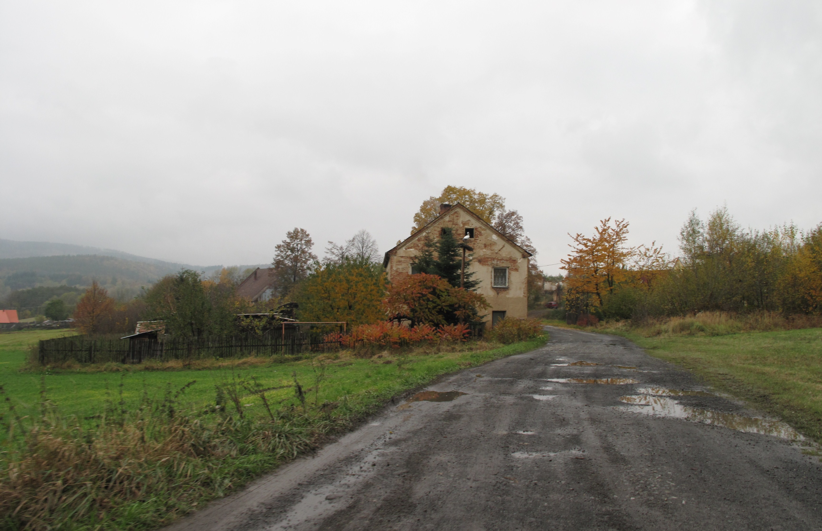 Damašek (Třemešná). Okres Bruntál, Česká republika.